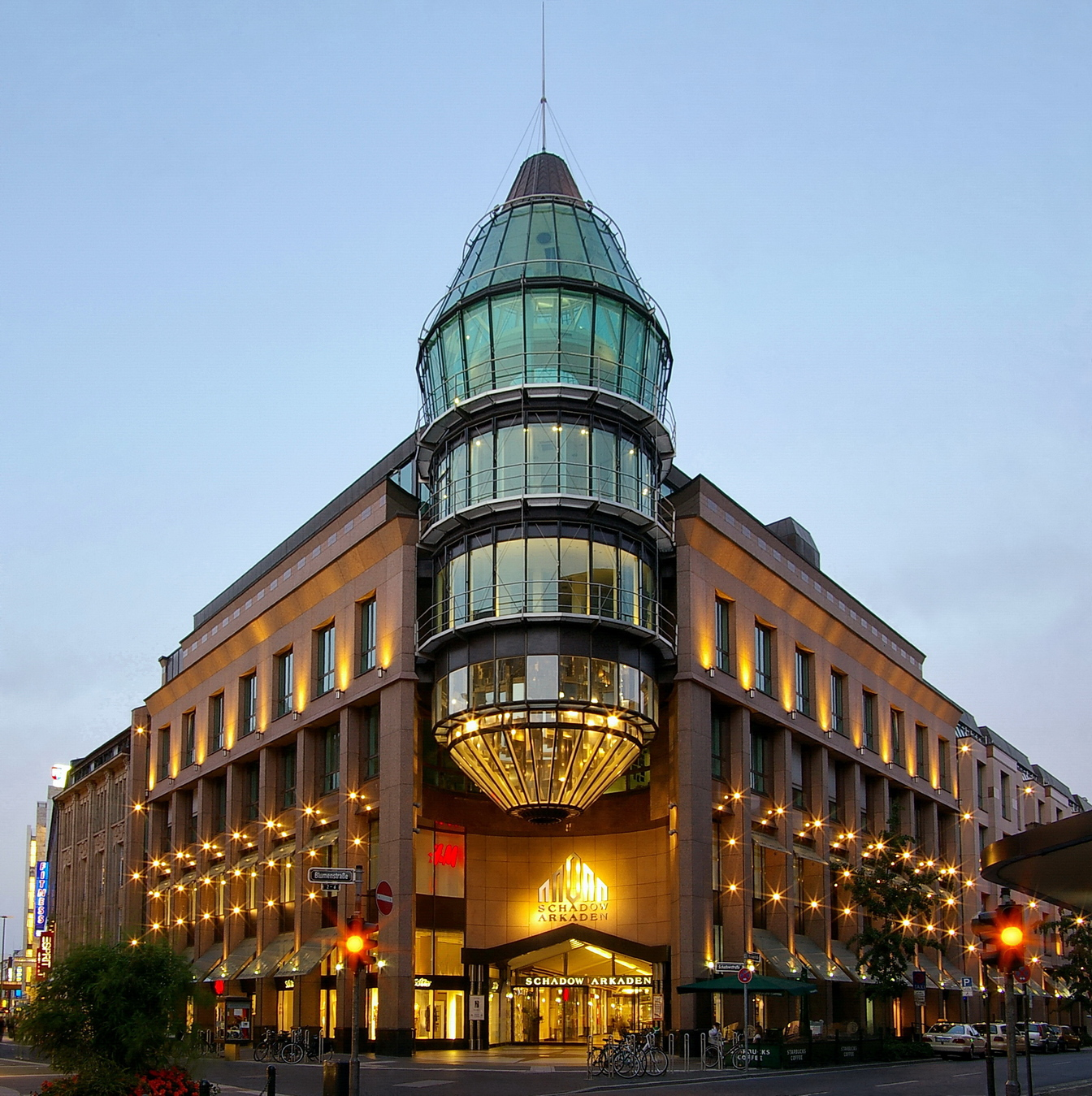 Eingang der Schadow Arkaden in Düsseldorf aus Blickrichtung von der Königsallee